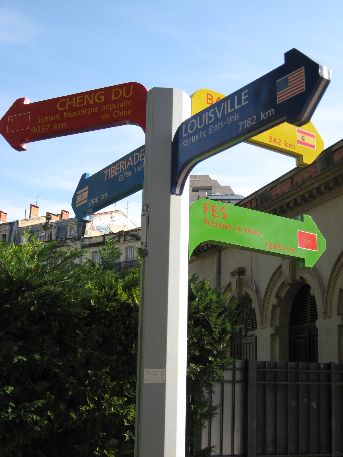 Panneau indicateur des villes jumelées avec la ville de Montpellier (France). Panneau visible près de l'Office de tourisme de Montpellier, sur l'Esplanade Charles de Gaulle.